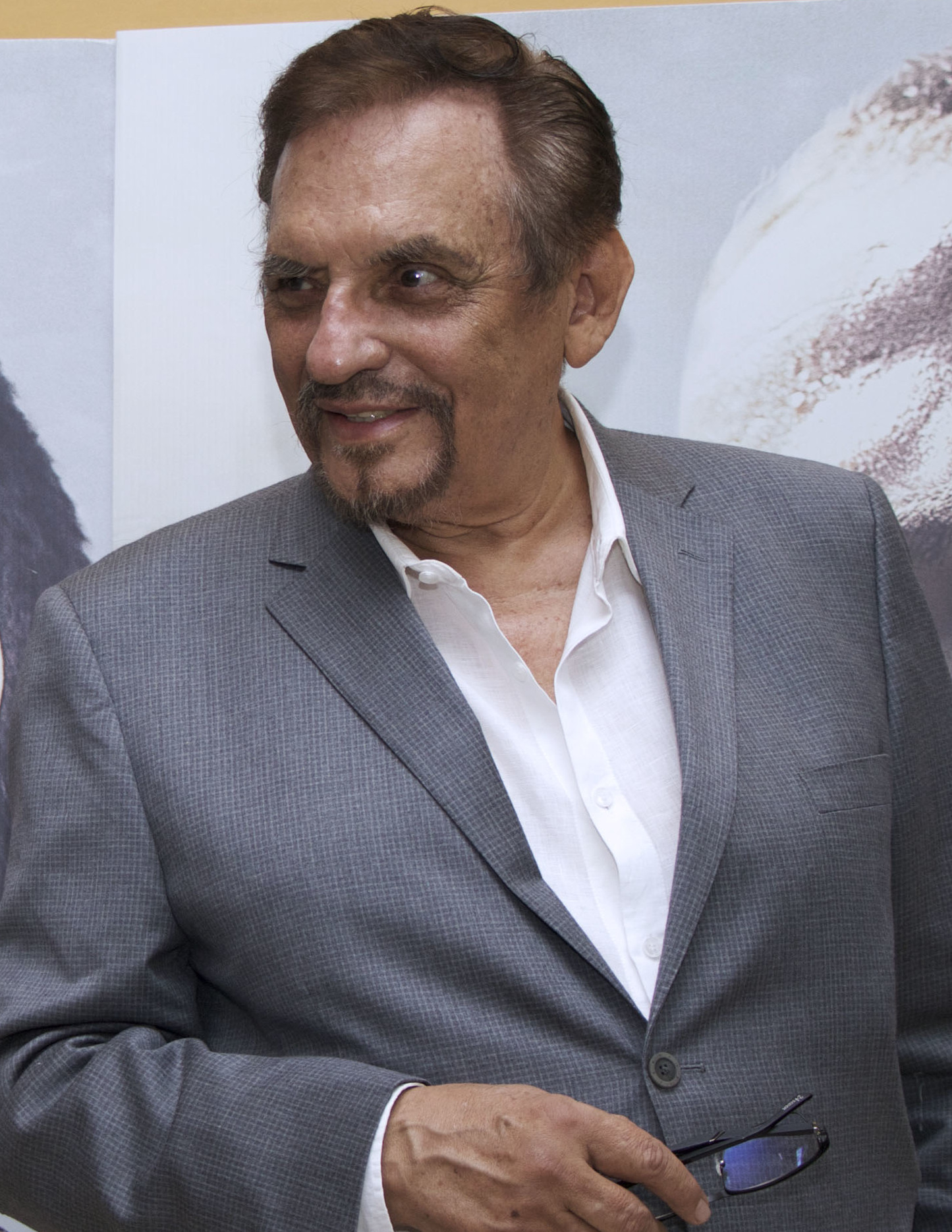 Lunes 2 de abril de 2018. En el Instituto Francés de América Latina, IFAL, se realizó la conferencia de prensa para dar a conocer el estreno nacional de la película La 4ª Compañía, a la que acudieron los protagonistas, Juan Carlos Flores, Adrián Ladrón, la directora Mitzi Vanessa Arreola y el director Amir Galván, el primer actor Manuel Ojeda y Carlos Valencia. La 4° Compañía cuenta con el apoyo de PROCINE, para ofrecer 15 funciones gratuitas en 10 sedes: Faros, salas delegacionales y colectivos culturales, así lo anunció su Titular. Fotografía: Milton Martínez / Secretaría de Cultura CDMX.